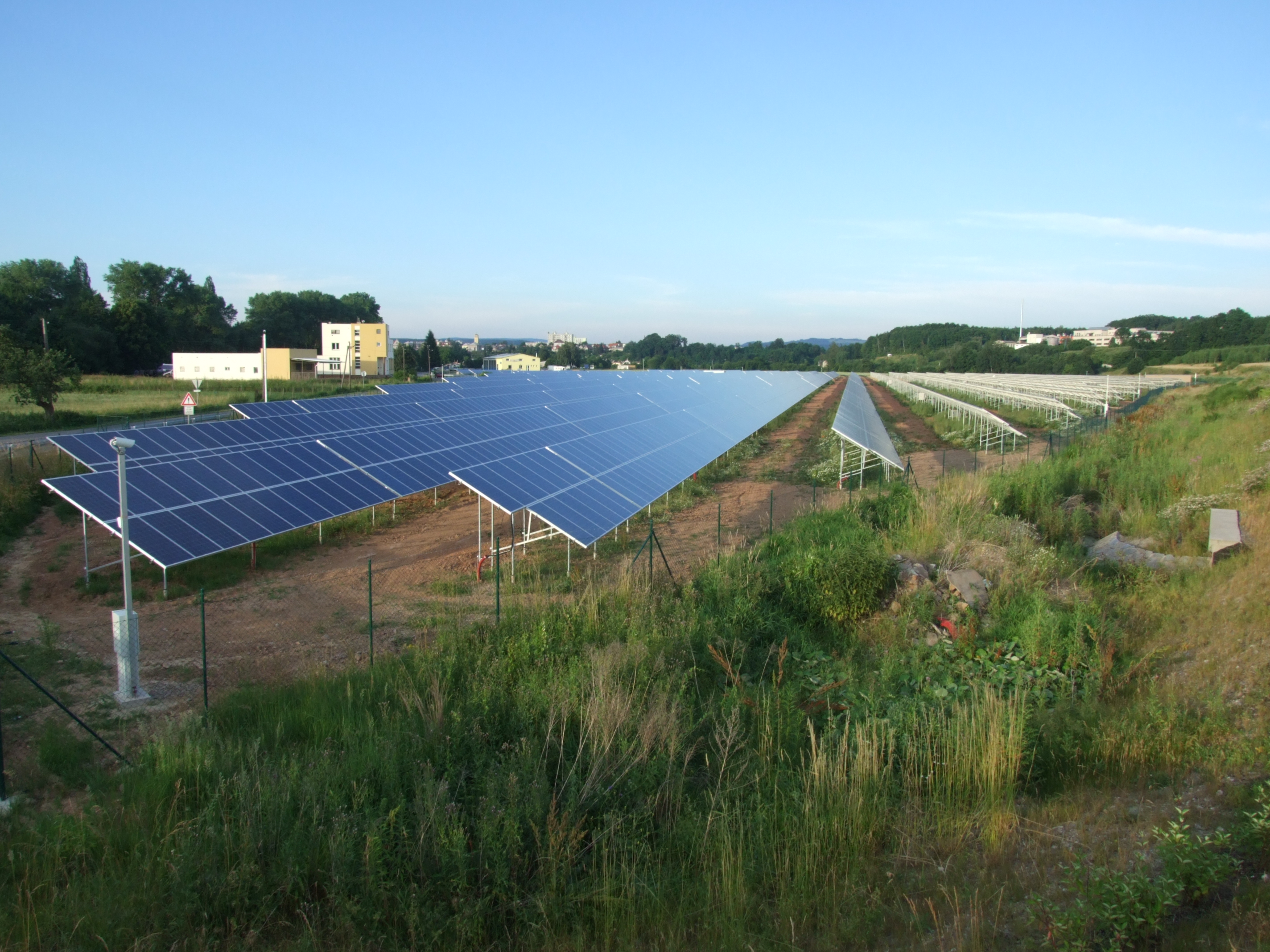 Solární (fotovoltaická) elektrárna (FVE) v České Skalici (okres Náchod)} [1] Parametry: 2800 KWp Termín výstavby: 04-07/2010 Investor: ENERGI BB s.r.o. Dodavatel technologie: CZ Elektronika s.r.o.